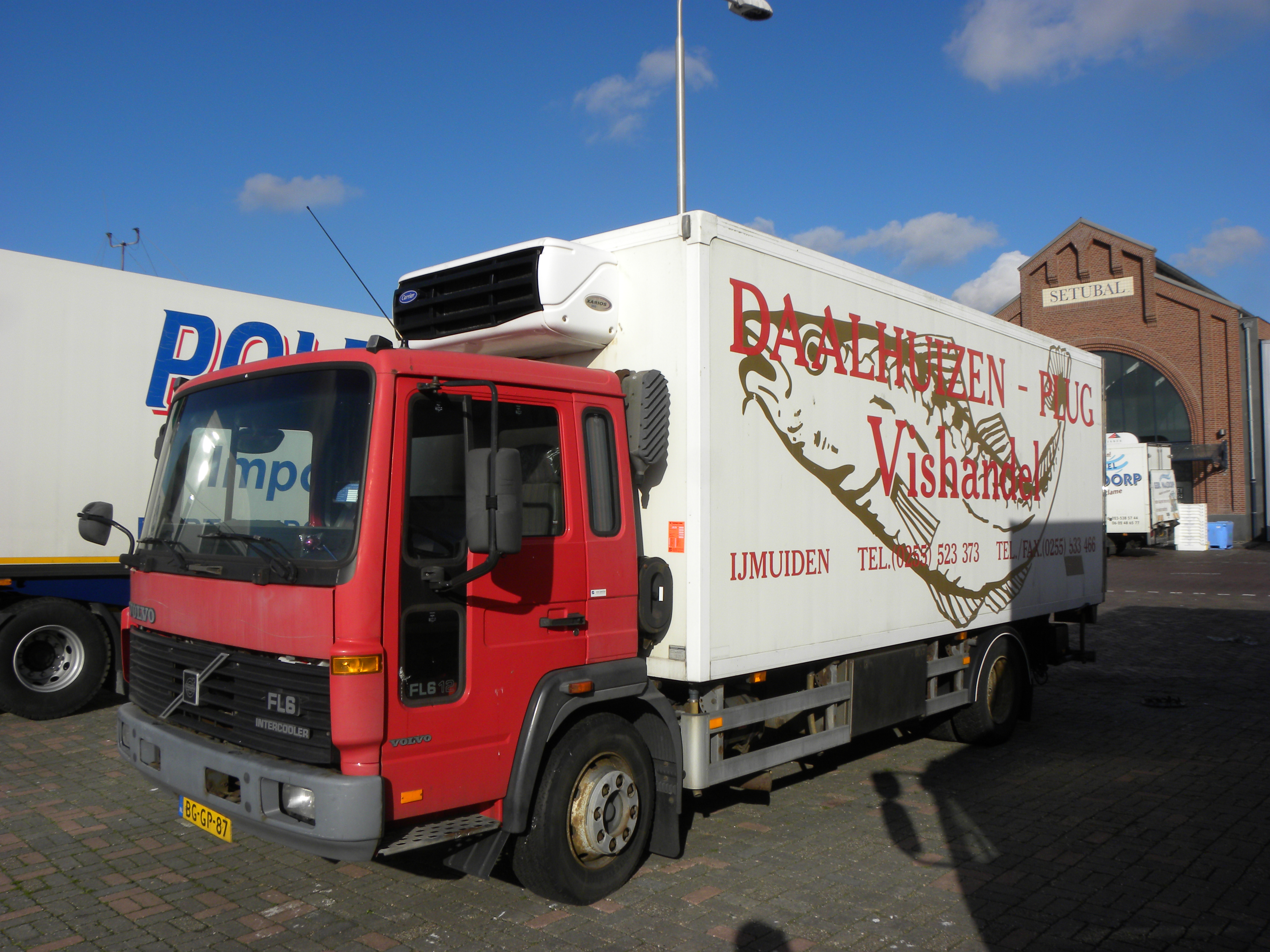 Volvo FL 6 Daalhuizen - Plug Vishandel IJmuiden